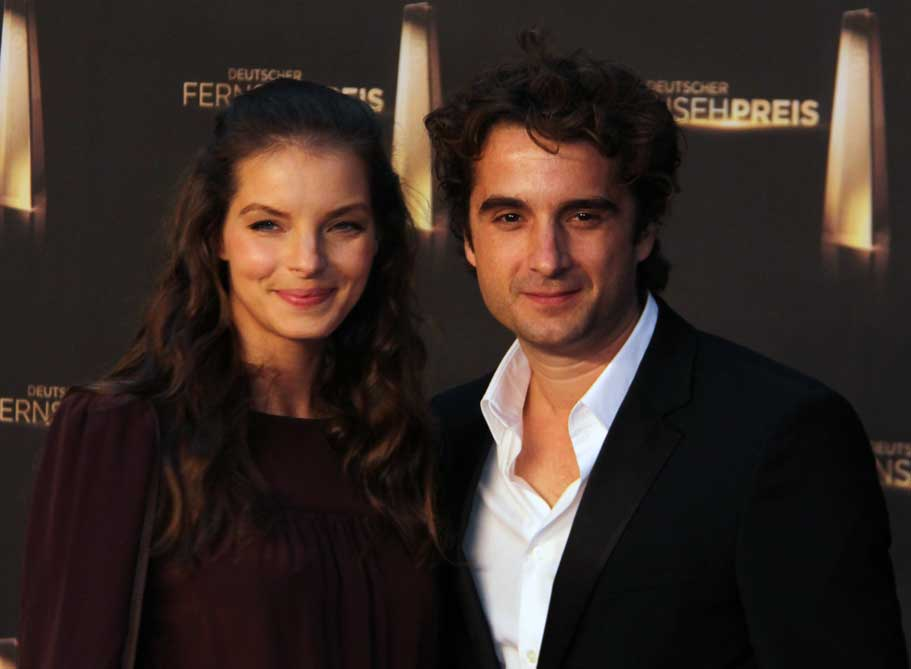 Yvonne Catterfeld und Oliver Wnuk beim Deutschen Fernsehpreis 2012